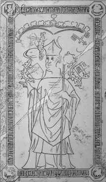 Biskop Peder Jensen Lodehats ligsten, Roskilde, Domkirke